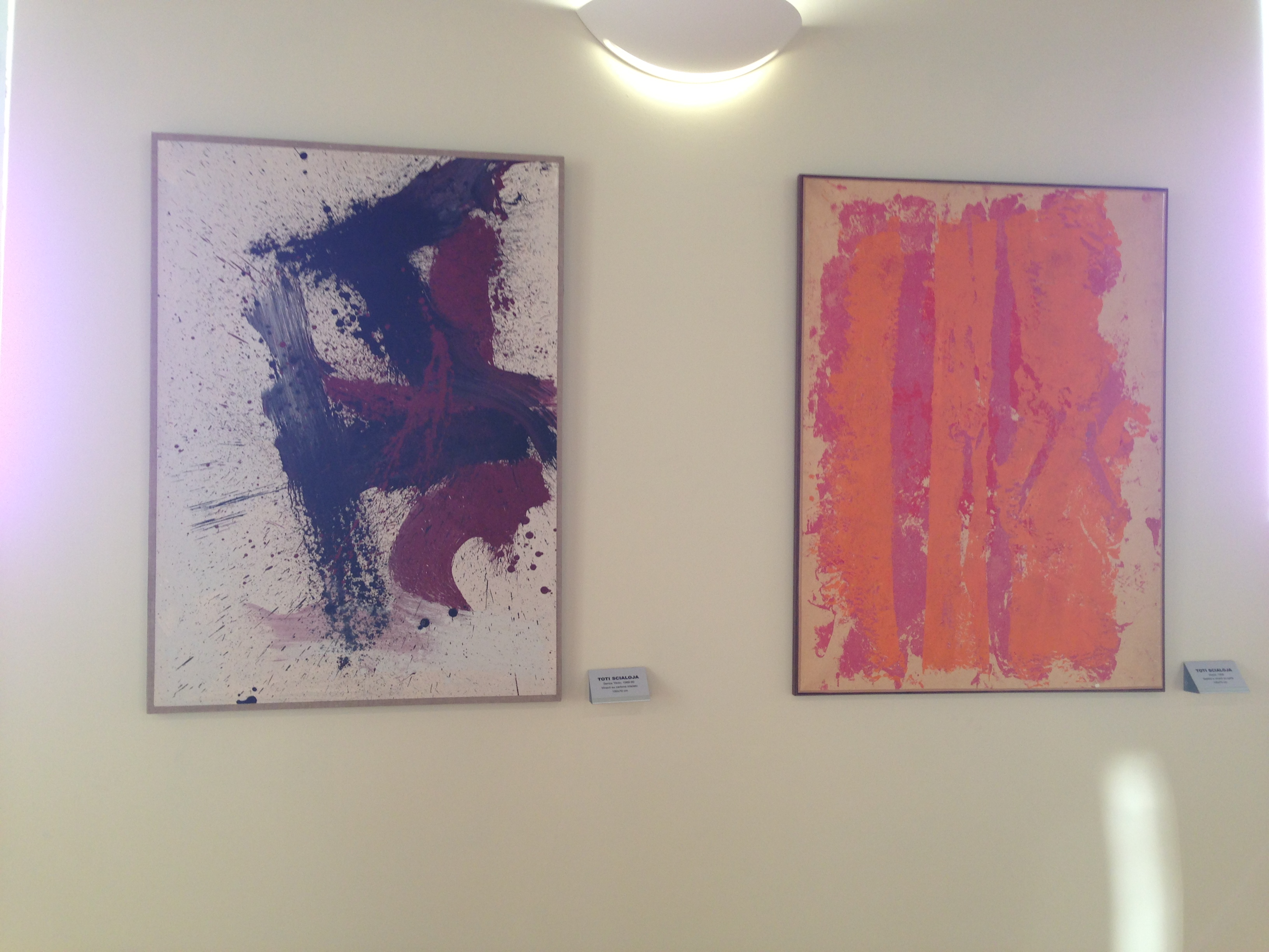 Museo Carandente Spoleto, Scialoja